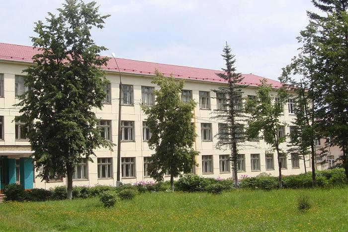 Школа в посёлке Дорохово (Рузский район).